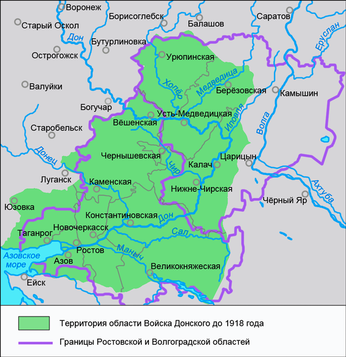 Карта области Войска Донского с наложенными на неё контурами современных Ростовской и Волгоградской областей. Источники: Brockhaus and Efron Encyclopedic Dictionary b54 360-1.jpg